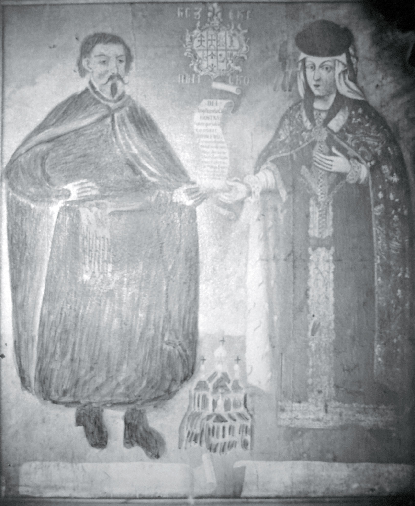 Беларуская (тарашкевіца): Партрэт Багдана Статкевіча (Bahdan Statkievič) і Алены Саламярэцкай (Alena Sałamiareckaja)